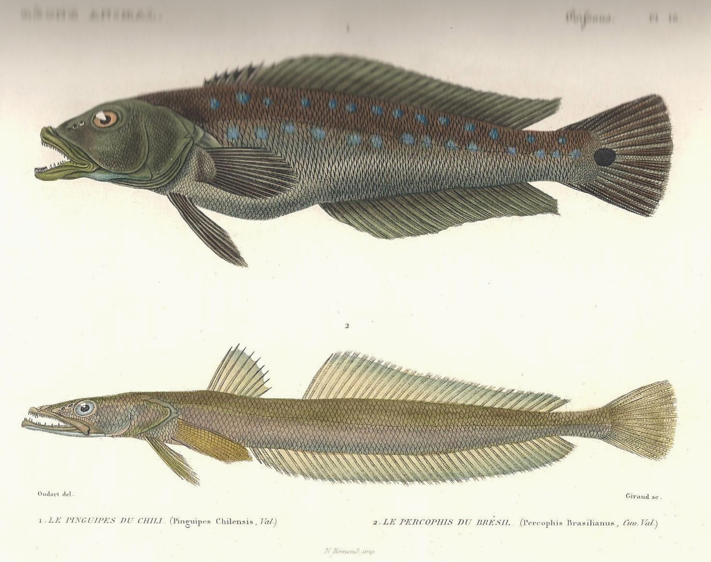 Planche N°10 du livre "Le règne animal distribué d'après son organisation" par Georges Cuvier (Tome 8), seconde édition de 1828, représentant : -en haut : Pinguipedes chilensis -en bas : Percophis brasiliensis